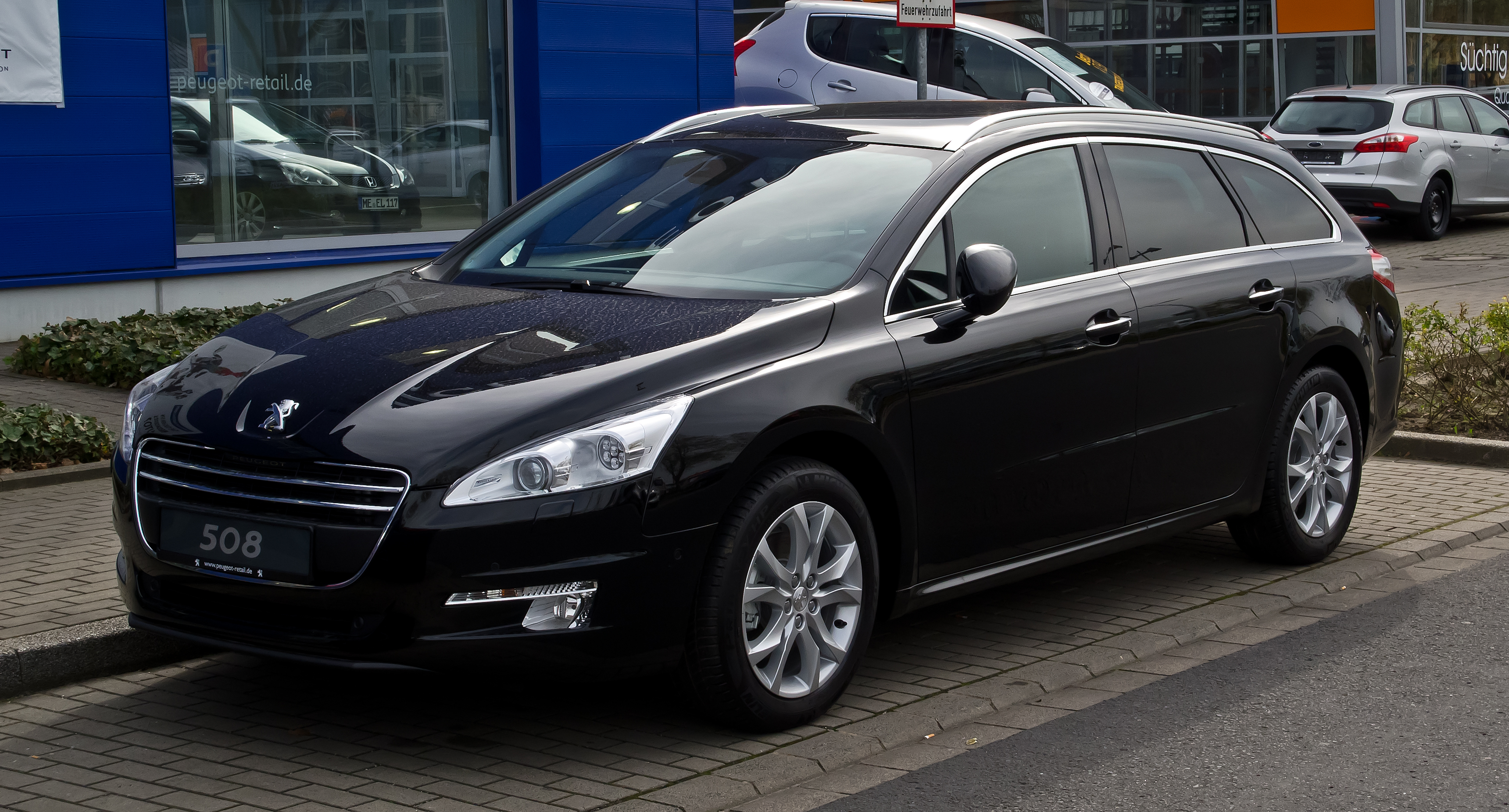 Peugeot 508 SW HDi FAP 160 Allure